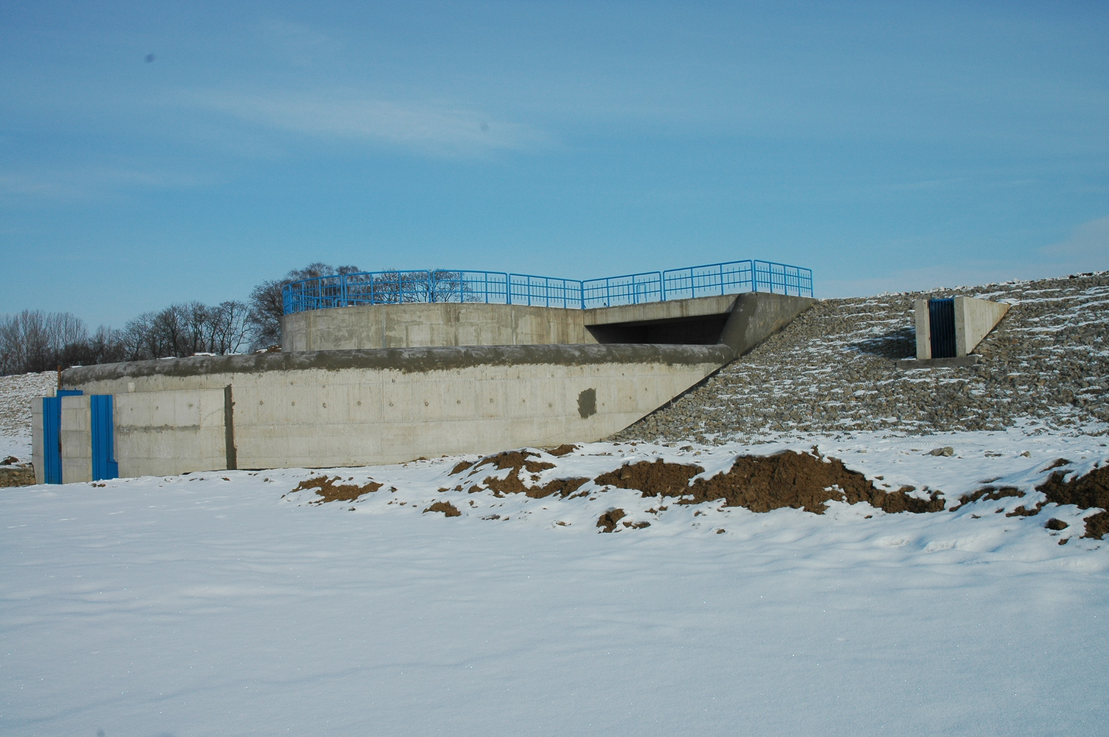 Zapora przeworno